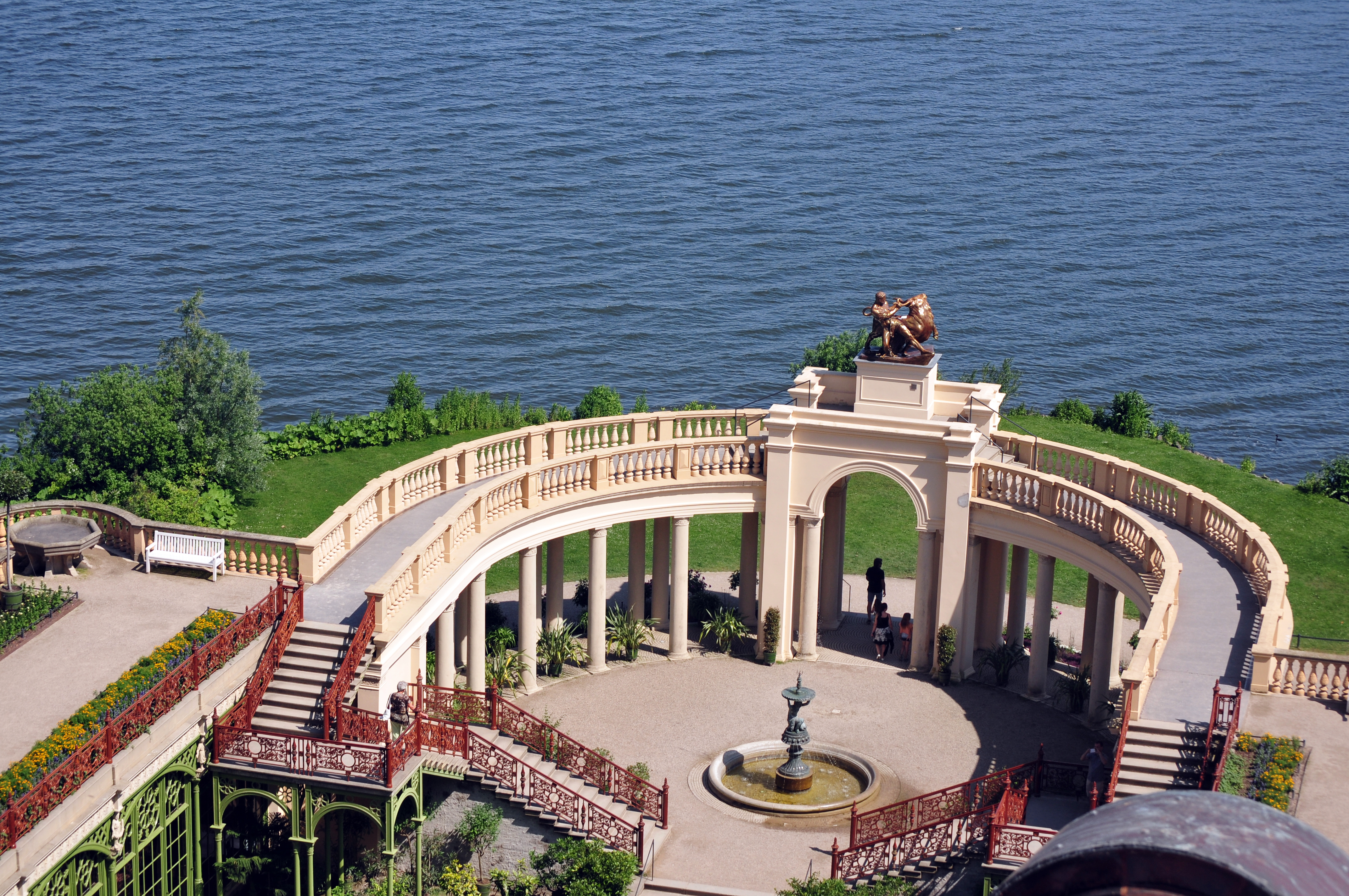 Schweriner Schloß; Orangerie und Schloßgarten